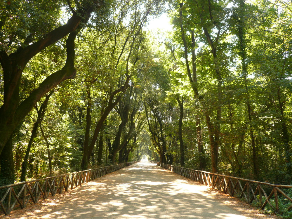 Il "Viale Centrale", con i suoi 1.300 metri è il più lungo di quelli che attraversano il parco di Capodimonte. Autore foto: Roberto De Martino